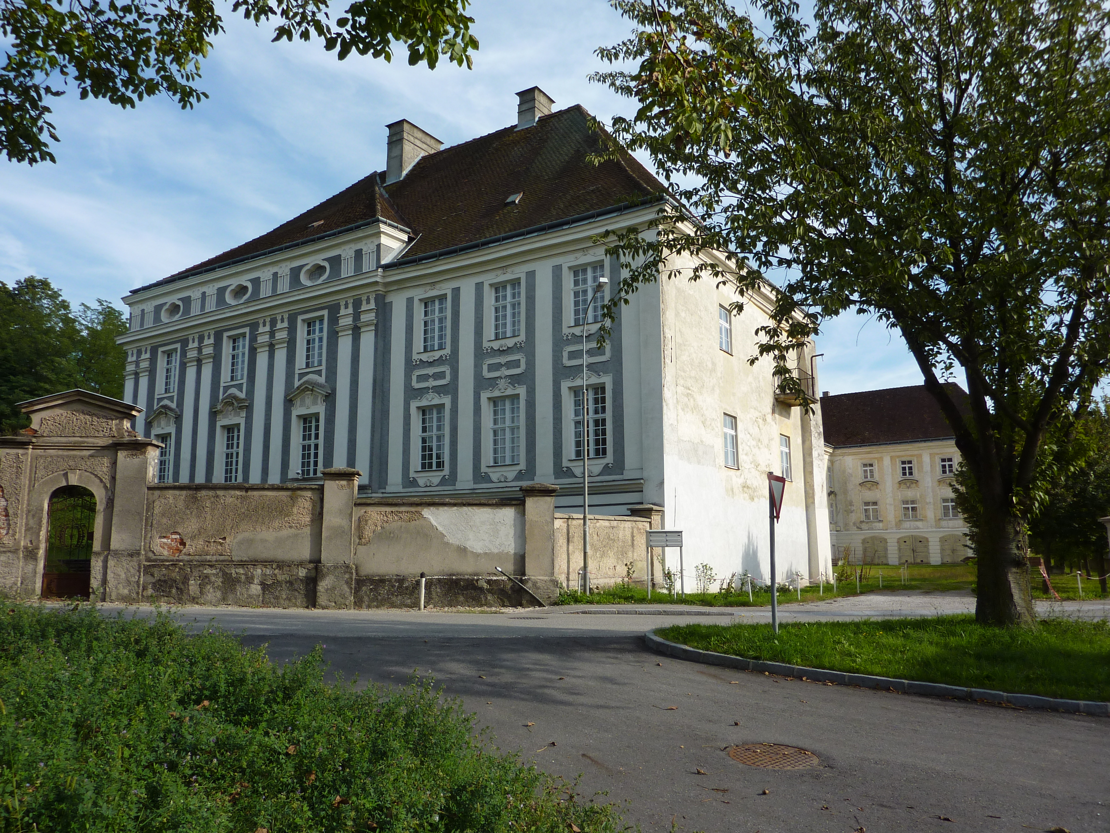 Stift Säusenstein - Nordflügel